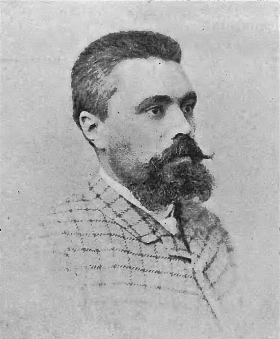 Wincenty Rawski (-1905)